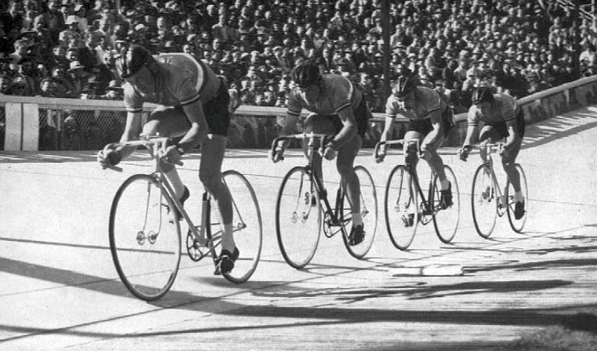 Équipe de France de poursuite vice-championne olympique à Melbourne (Michel Vermeulin, Jean Graczyk, Jean-Claude Lecante et René Bianchi.).